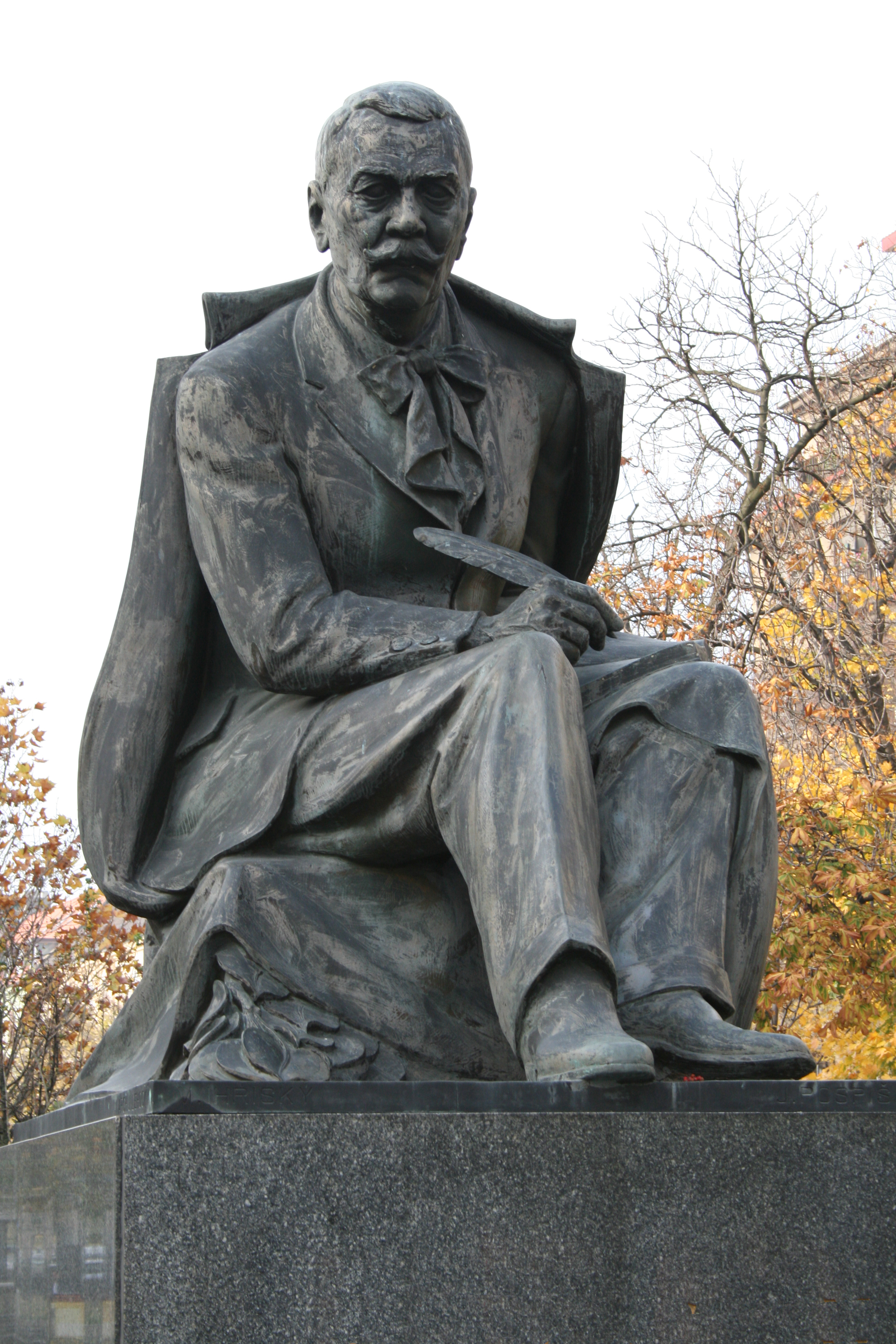 Bratislava: Ihriský&Pospíšil; bronzová plastika P. O. Hviezdoslava, rok 1938